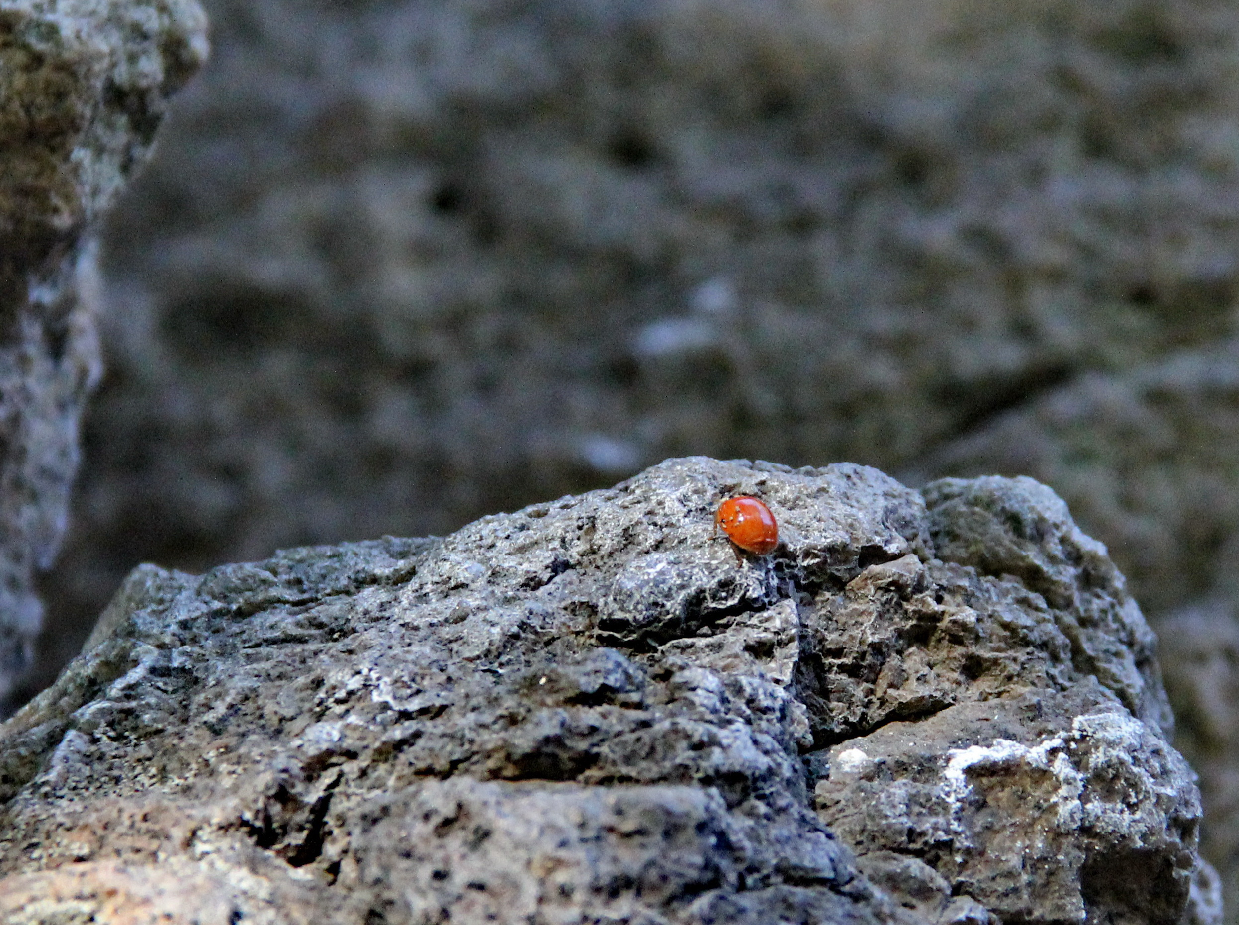 Сонечко-арлекін (Harmonia axyridis var. succinea) на скелях ок. с. Дениші.